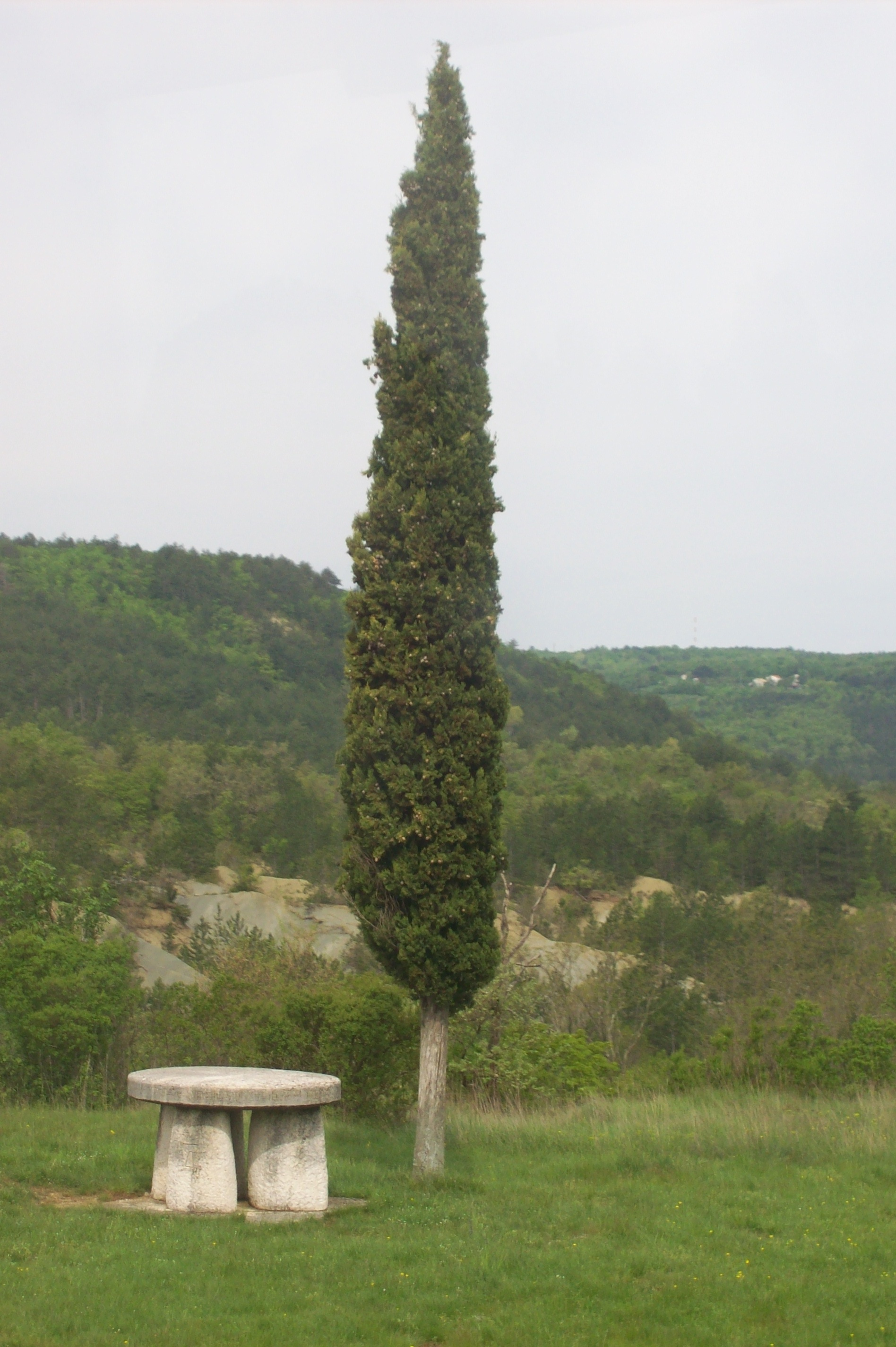 Kameni stol Ćirila i Metoda, Aleja glagoljaša